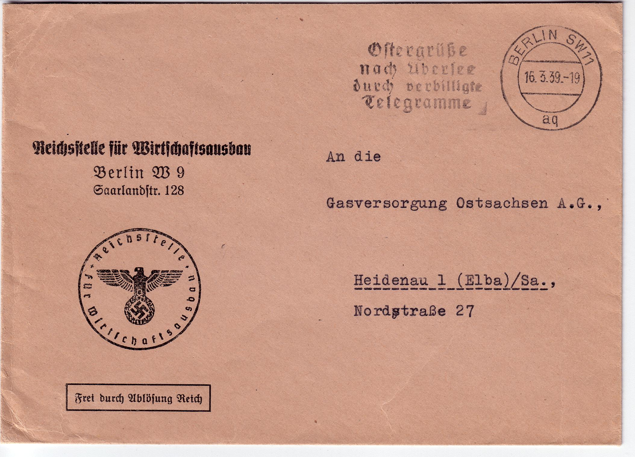 Dienstbrief der Reichsstelle für Wirtschaftsausbau in Berlin von 1939. Dienstsiegel: "Reichsstelle für Wirtschaftsausbau" Poststempel: "Berlin SW11, 16.3.39